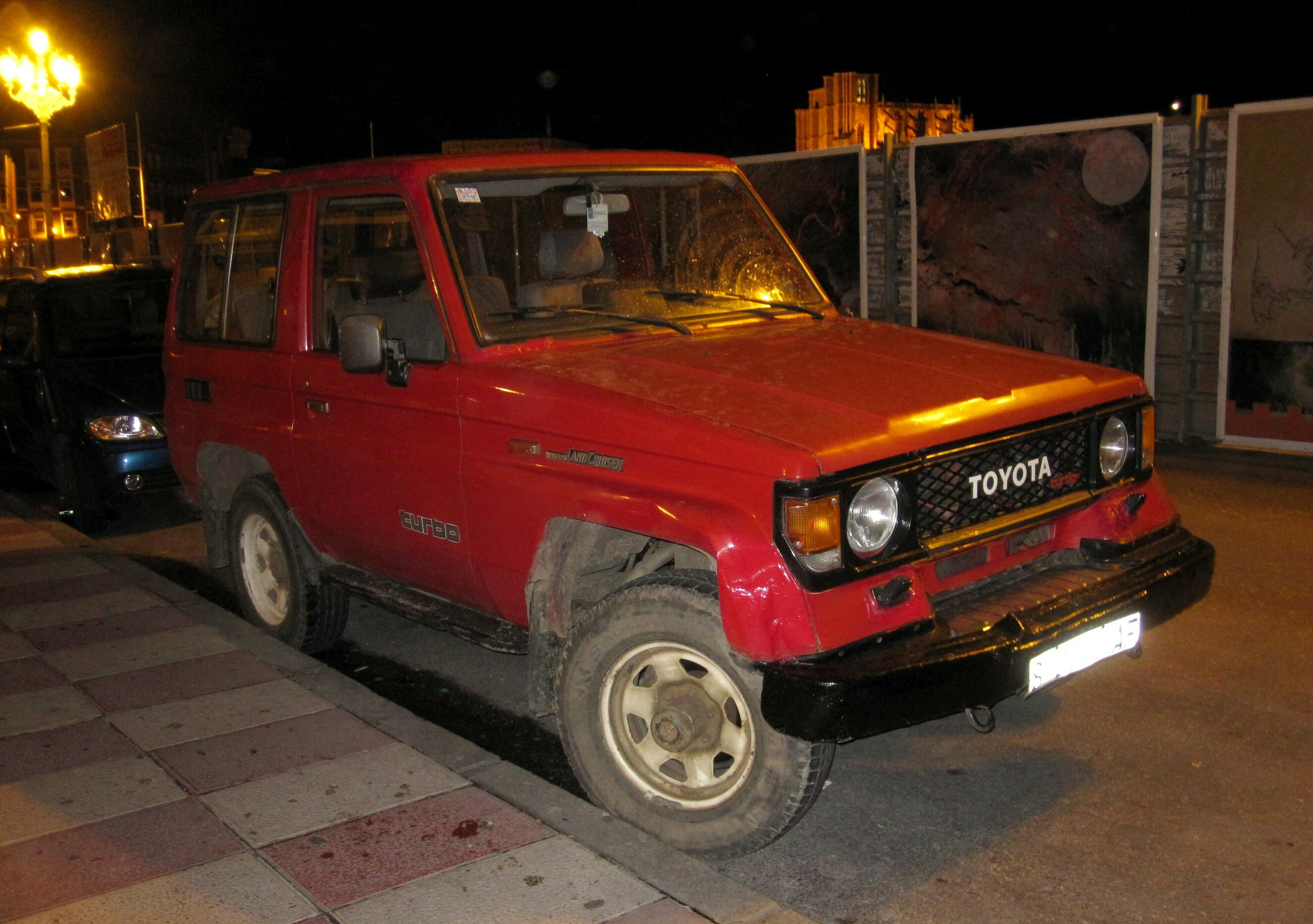 1995 late from Santander (Cantabria), seen in Castro Urdiales (Cantabria).